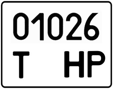 Госномера технологиечского транспорта ДНР